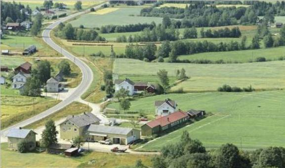 Lierfoss sentrum anno 1968. Bildets eier, Akershusmuseet (v/ Atilla Moen-Duran), har gitt tillatelse til bruk på Wikipedia. Bildet er over 50 år gammelt og kan ikke ansees som kunstverk, slik at bildet er å betrakte som public domain.